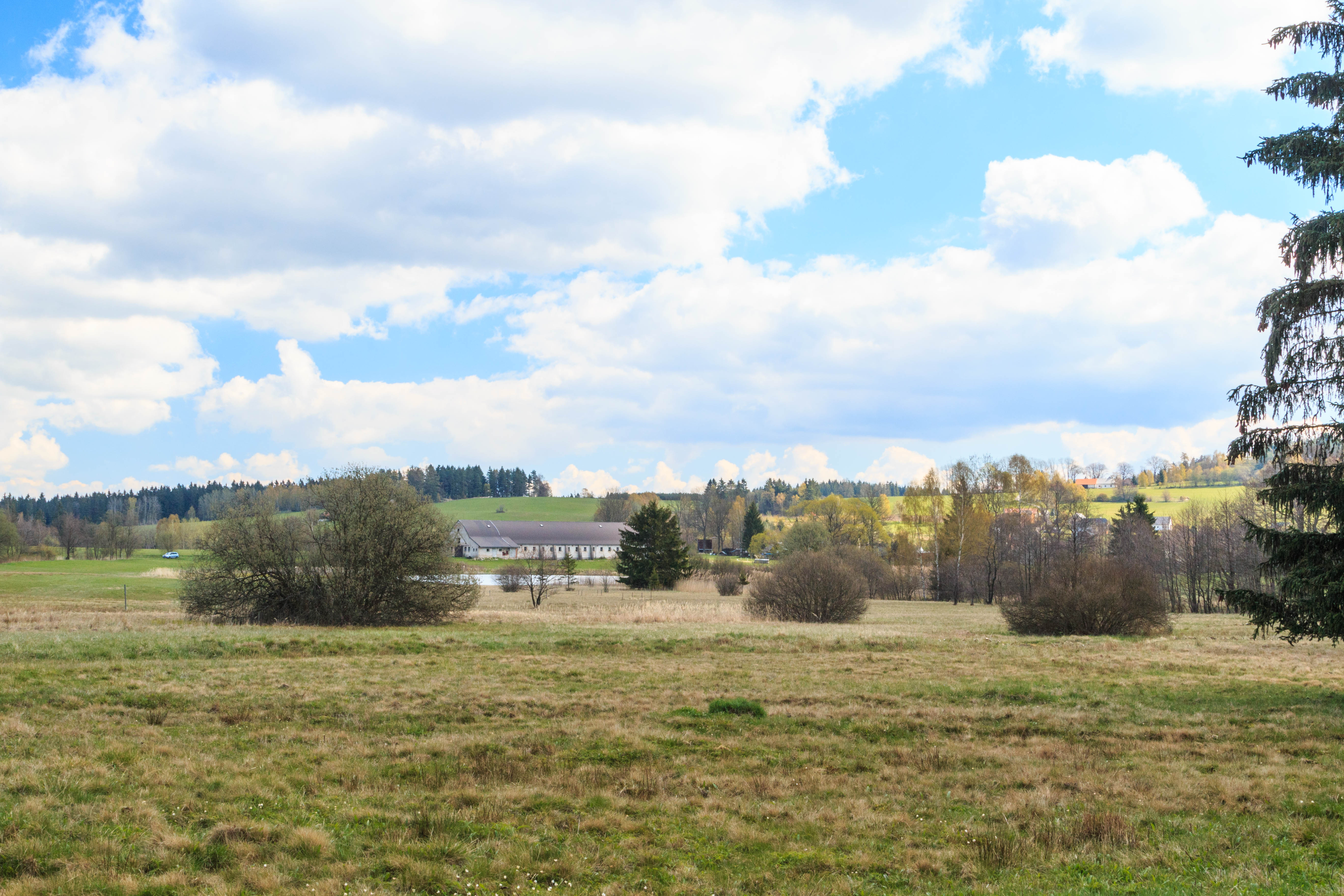 Přírodní památka Návesník Project: Chráněná území.